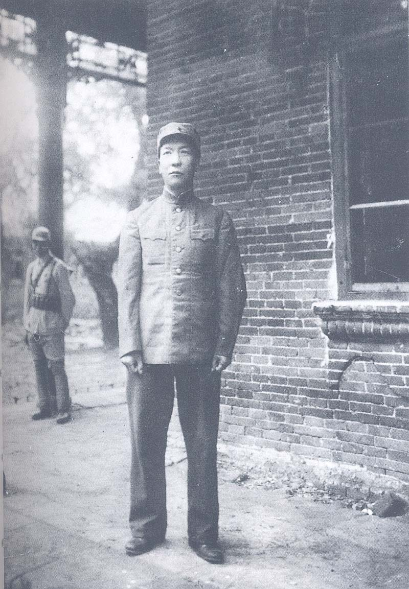 1946年8月，周保中于延吉吉林军区司令部。